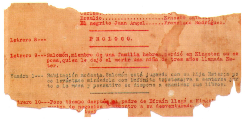 Fragment du scénario original de María, écrit par Alfredo del Diestro.